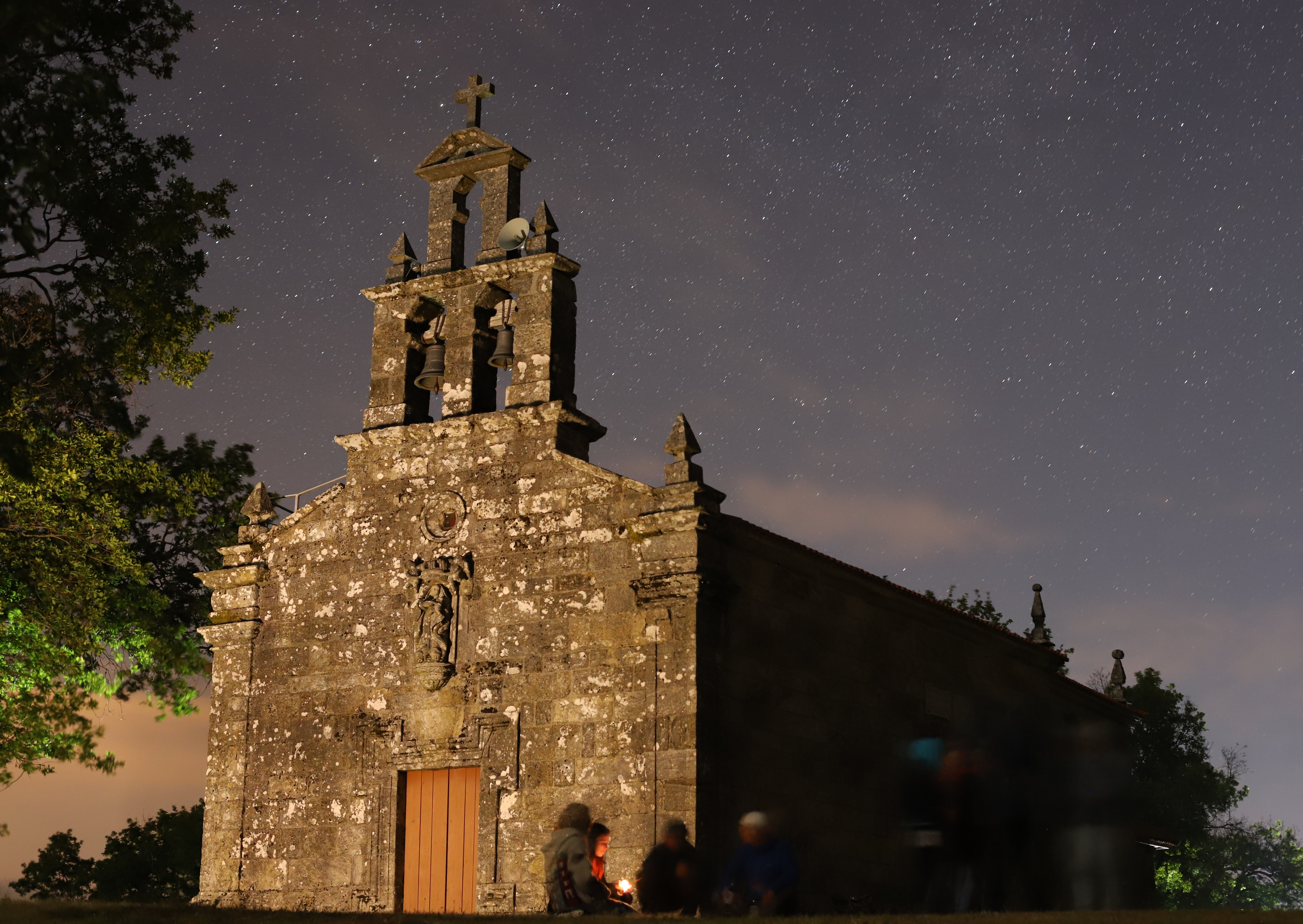 Die Kirche "Nuestra Señora del Viso" in Lobeira, Ourense, Spanien bei Nacht.